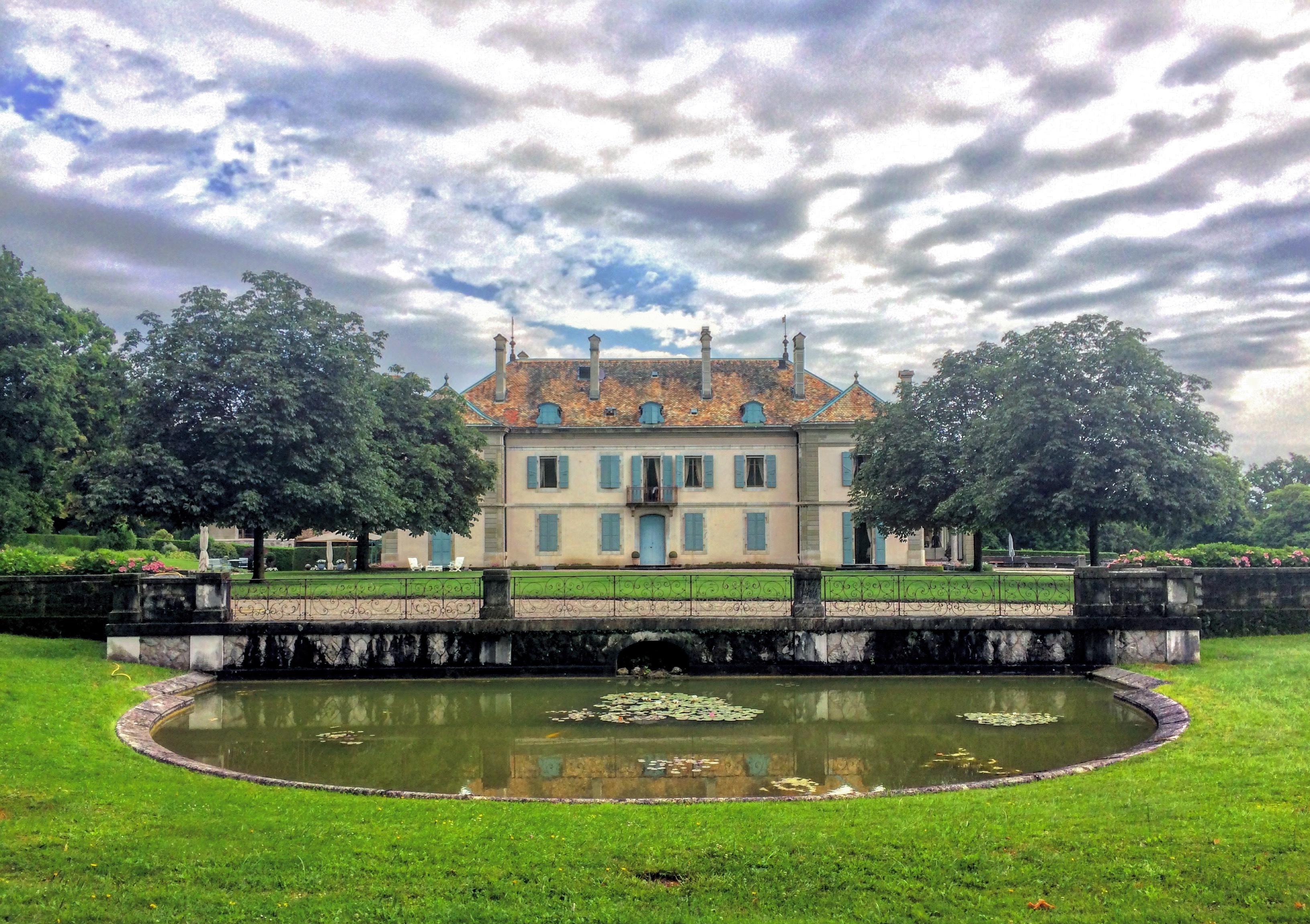 Le château du Reposoir à Pregny-Chambésy, dans la campagne genevoise.